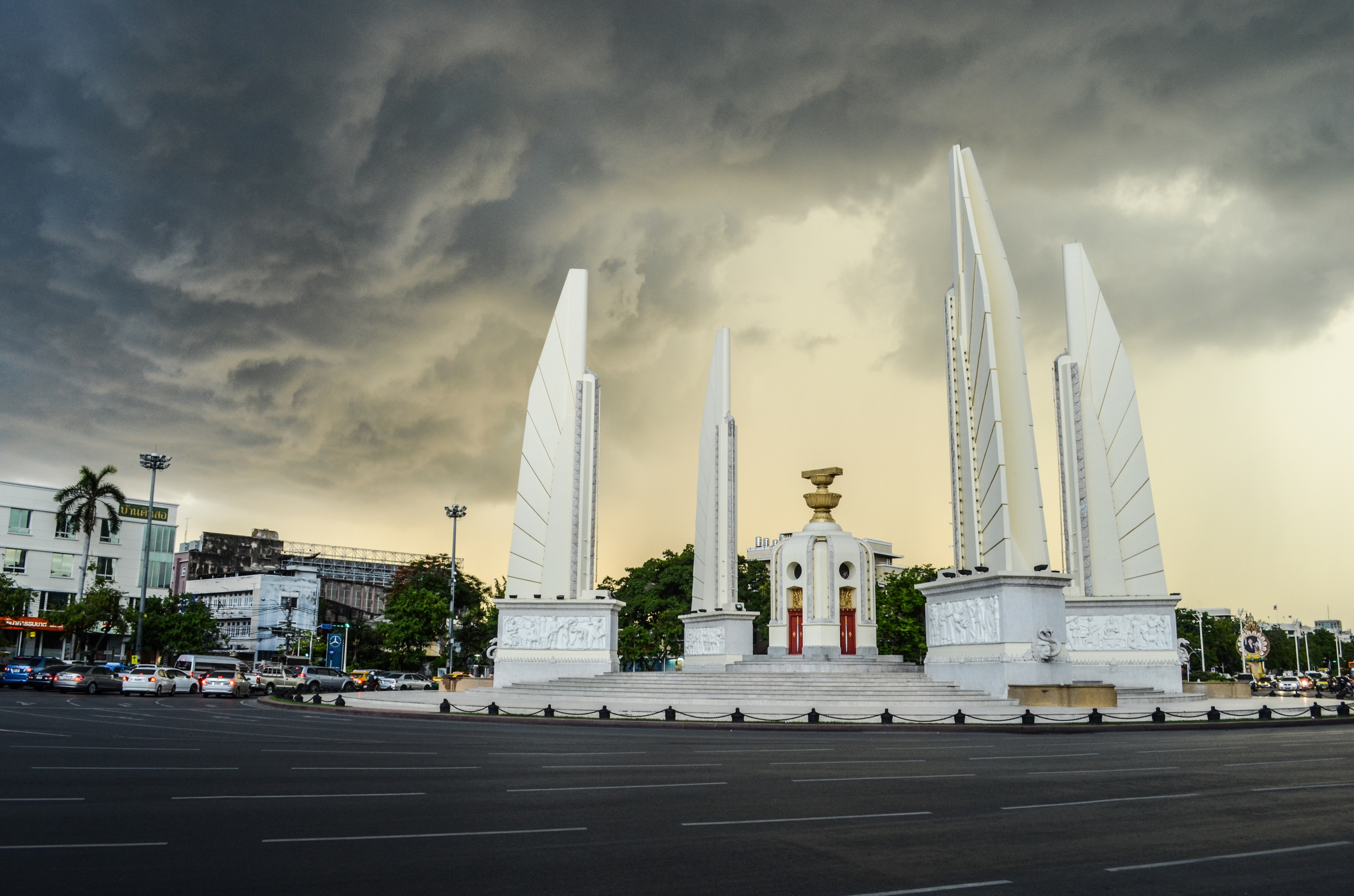 อนุสาวรีย์ประชาธิปไตย